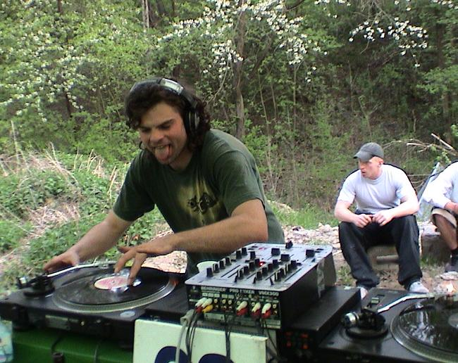 DJ ze soundsystemu RSD